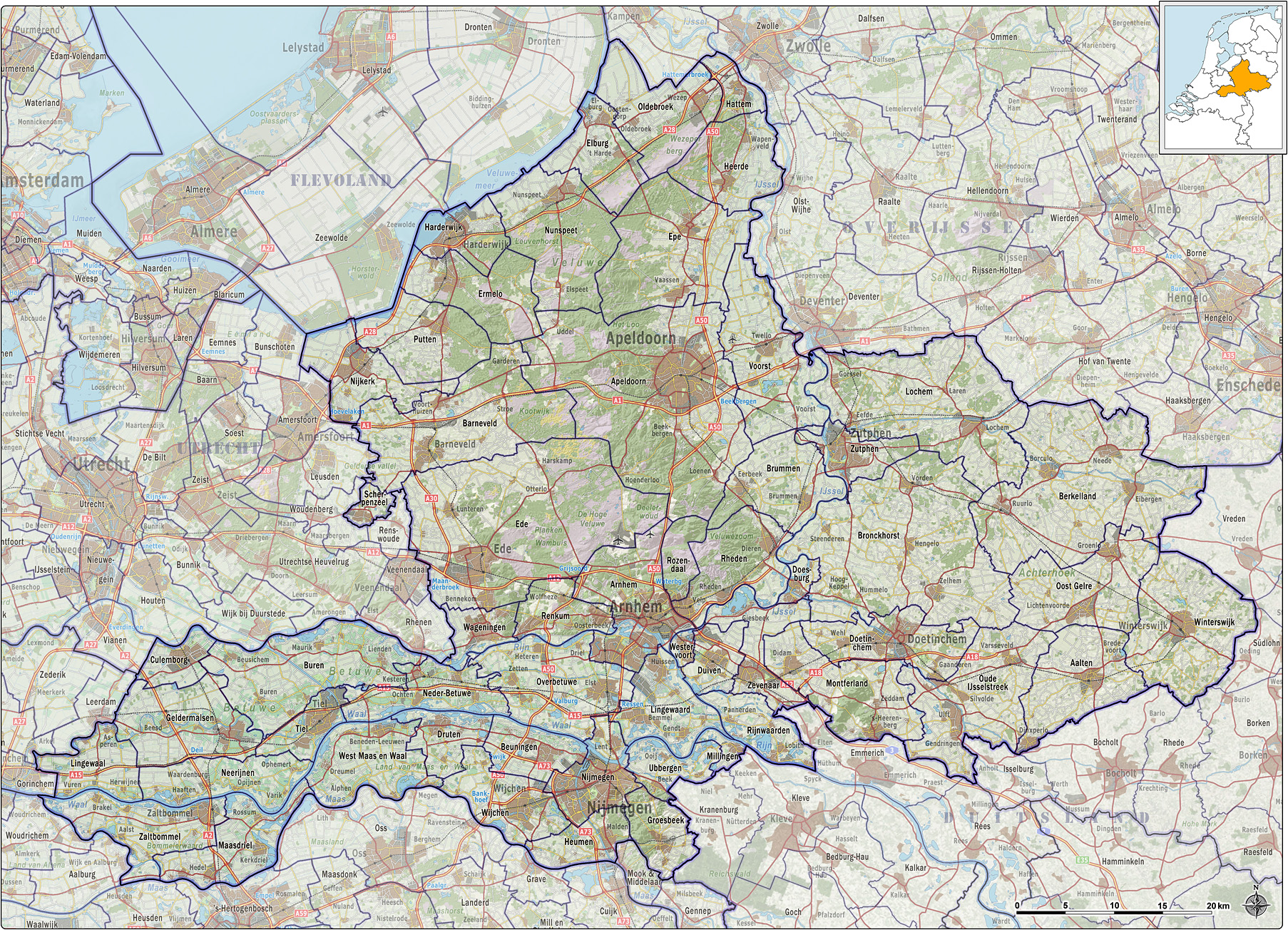 Kaart van de Nederlandse provincie Gelderland, met gemeentegrenzen per 2012 en impressie van het landschap. Referentie-ondergrond (kustlijn, steden, wegen) gerasterd uit de OpenStreet Map OSM. Inhoud is beschikbaar onder de Creative Commons Attribution-ShareAlike 3.0 license. Referentie-ondergrond op water bewerkt vanuit Gebruik is vrij met bronvermelding NLR en ESA. Vectorgrenzen van gemeenten op basis van het vrij te gebruiken geo-bestand van het CBS. Hoogte-aanduidingen (reliëf) gerasterd uit de AHN Viewer ( gebruik is vrij met bronvermelding (c) AHN, Overige kenmerken op de kaart: eigen tekenwerk.